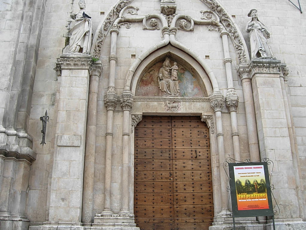 Ingresso Museo Civico di Sulmona Foto personale